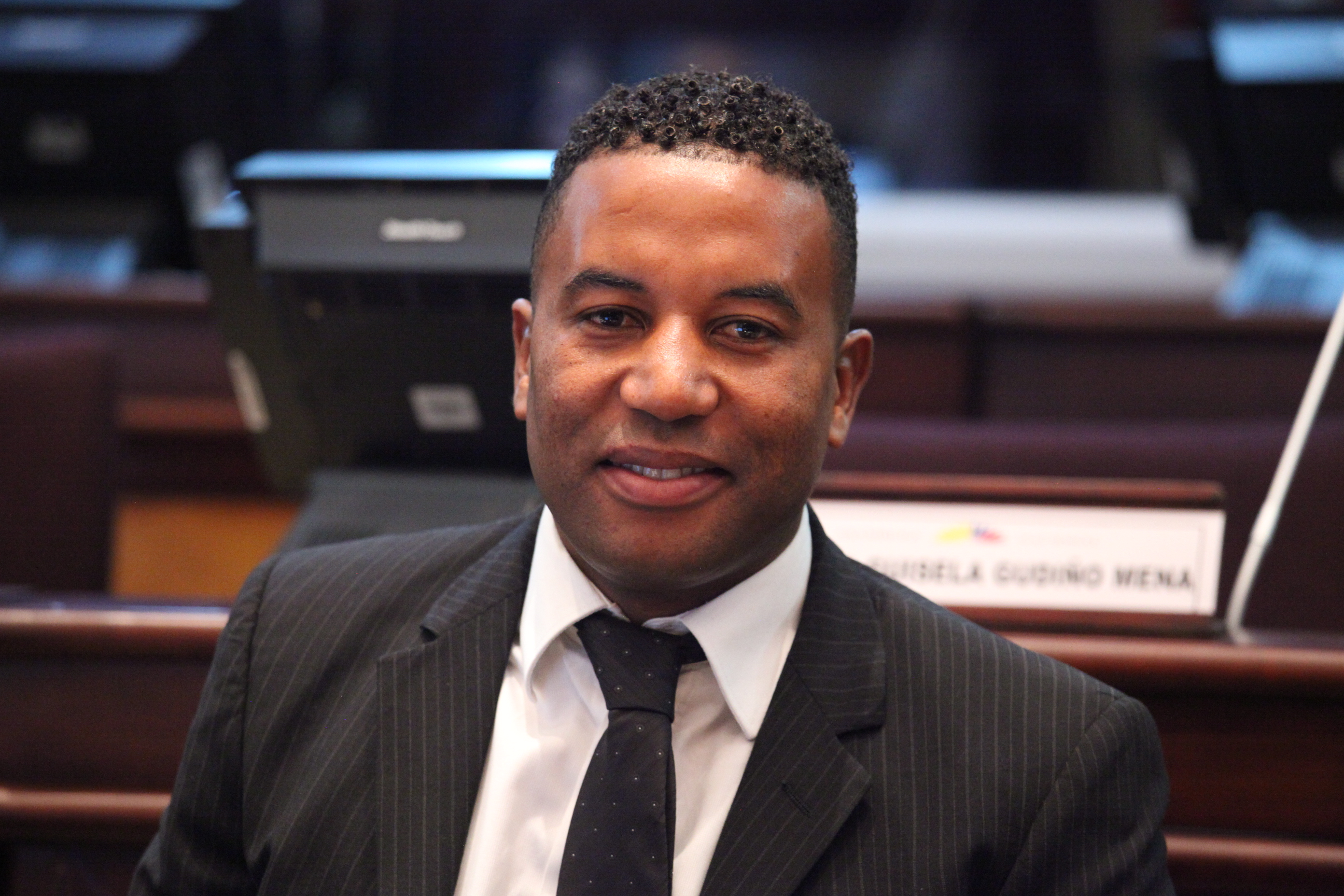 Foto: Hugo Ortiz Ron / Asamblea Nacional